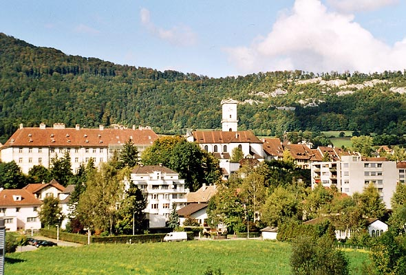 Blick auf Delémont